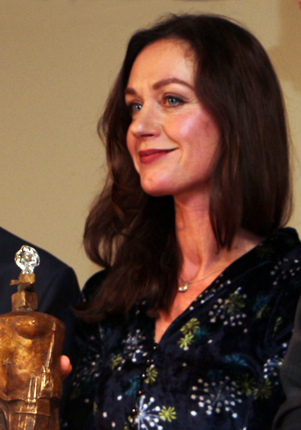 Porträt Christiane Budig, 2018 Depicted person: Q62068641